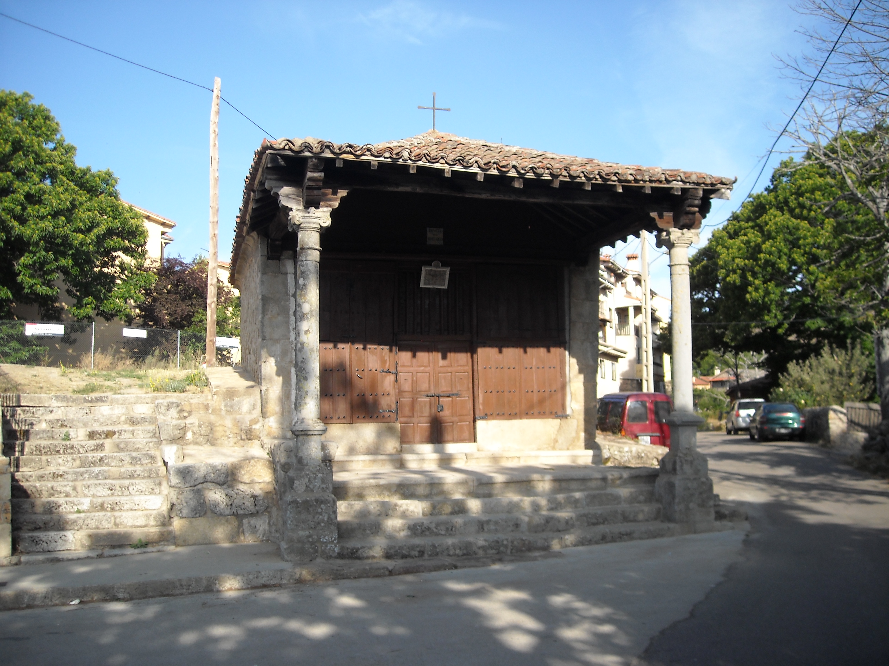 Ermita del Humilladero, La Alberca, Salamanca, España